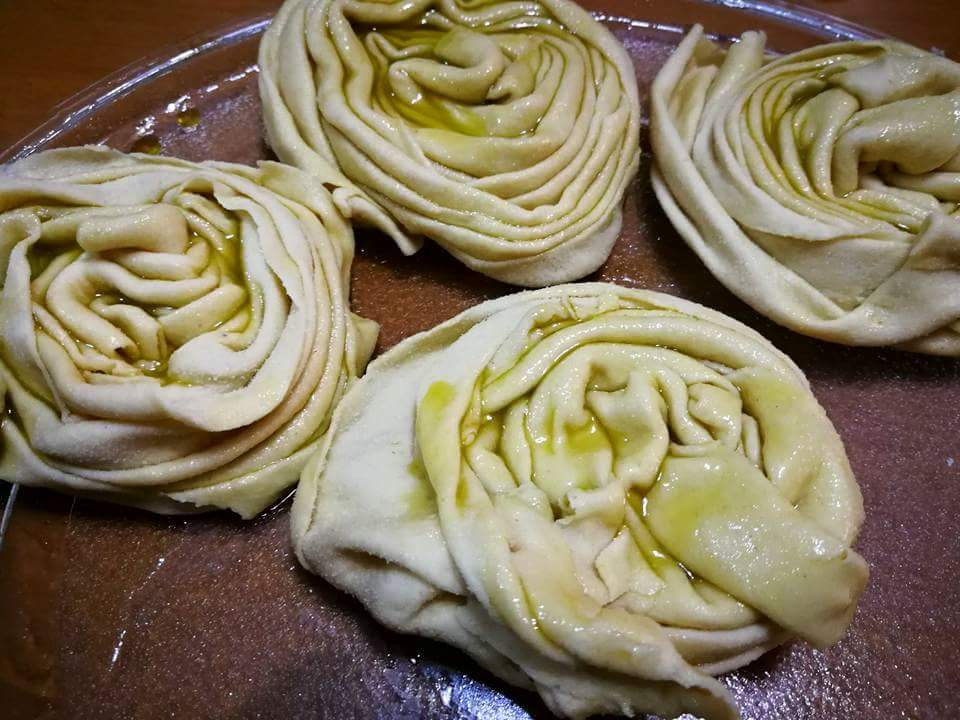 piruni arrotolati